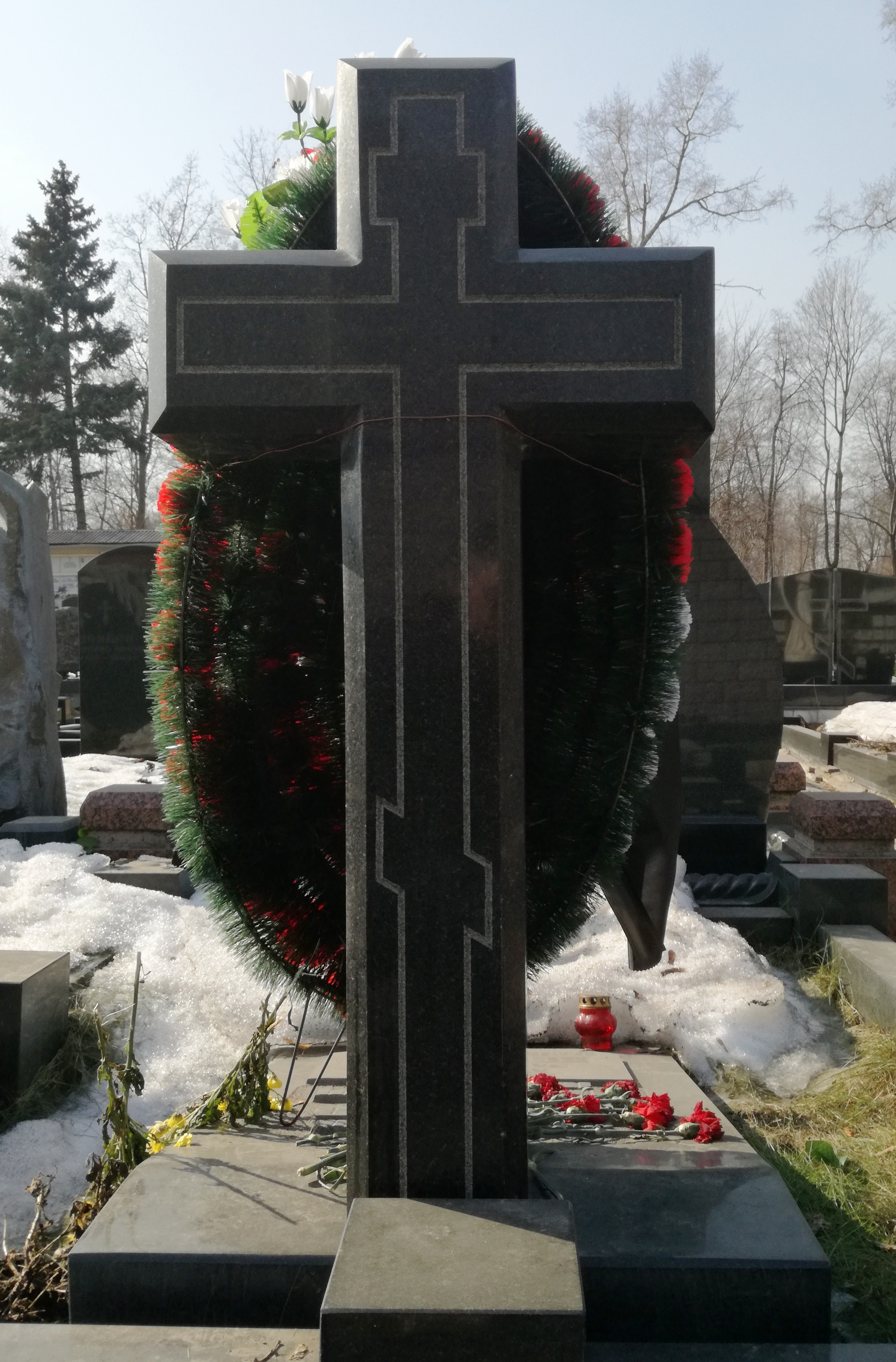 Даниловское кладбище